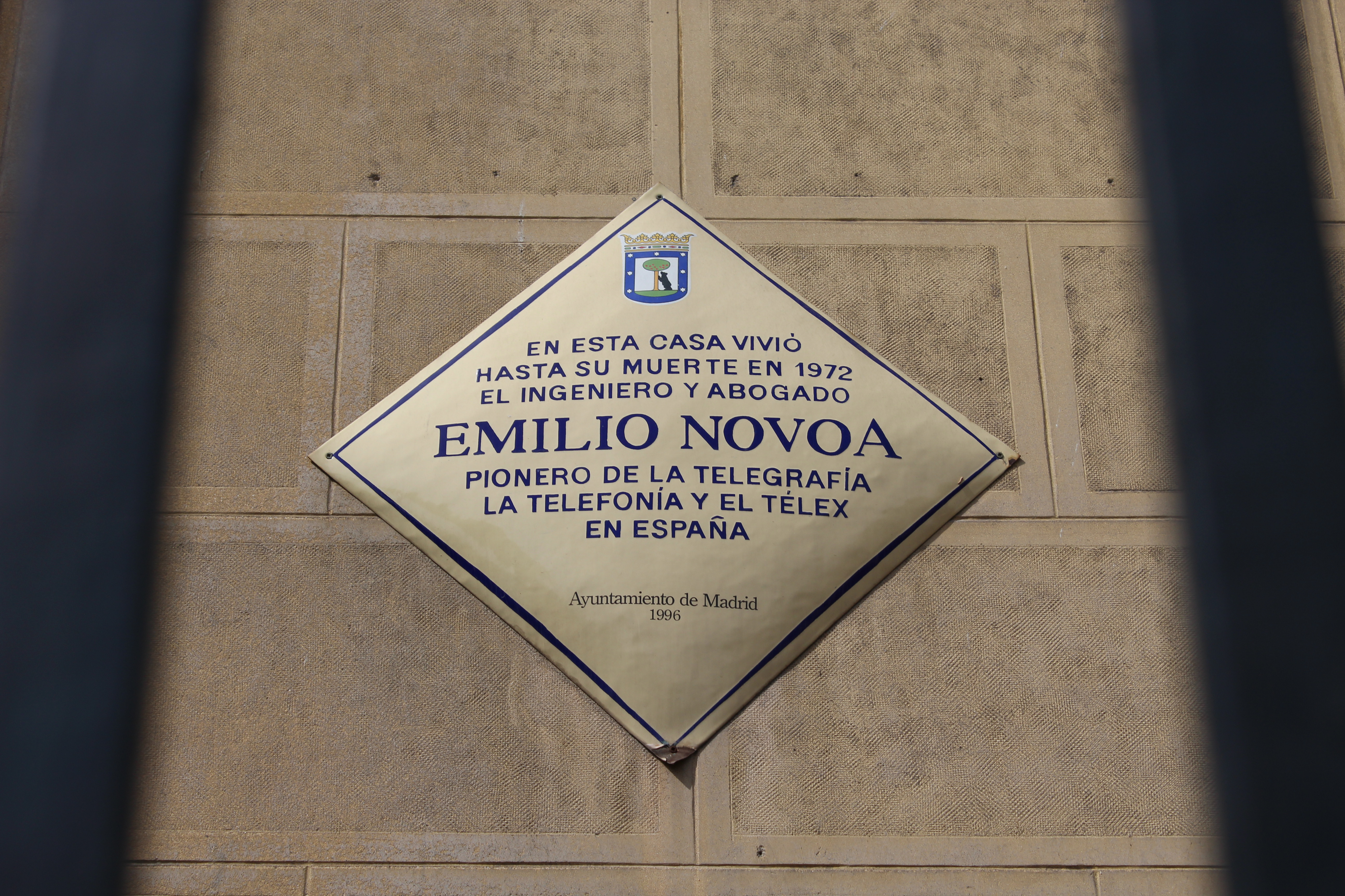 Aquí vivió Emilio Novoa, Madrid.